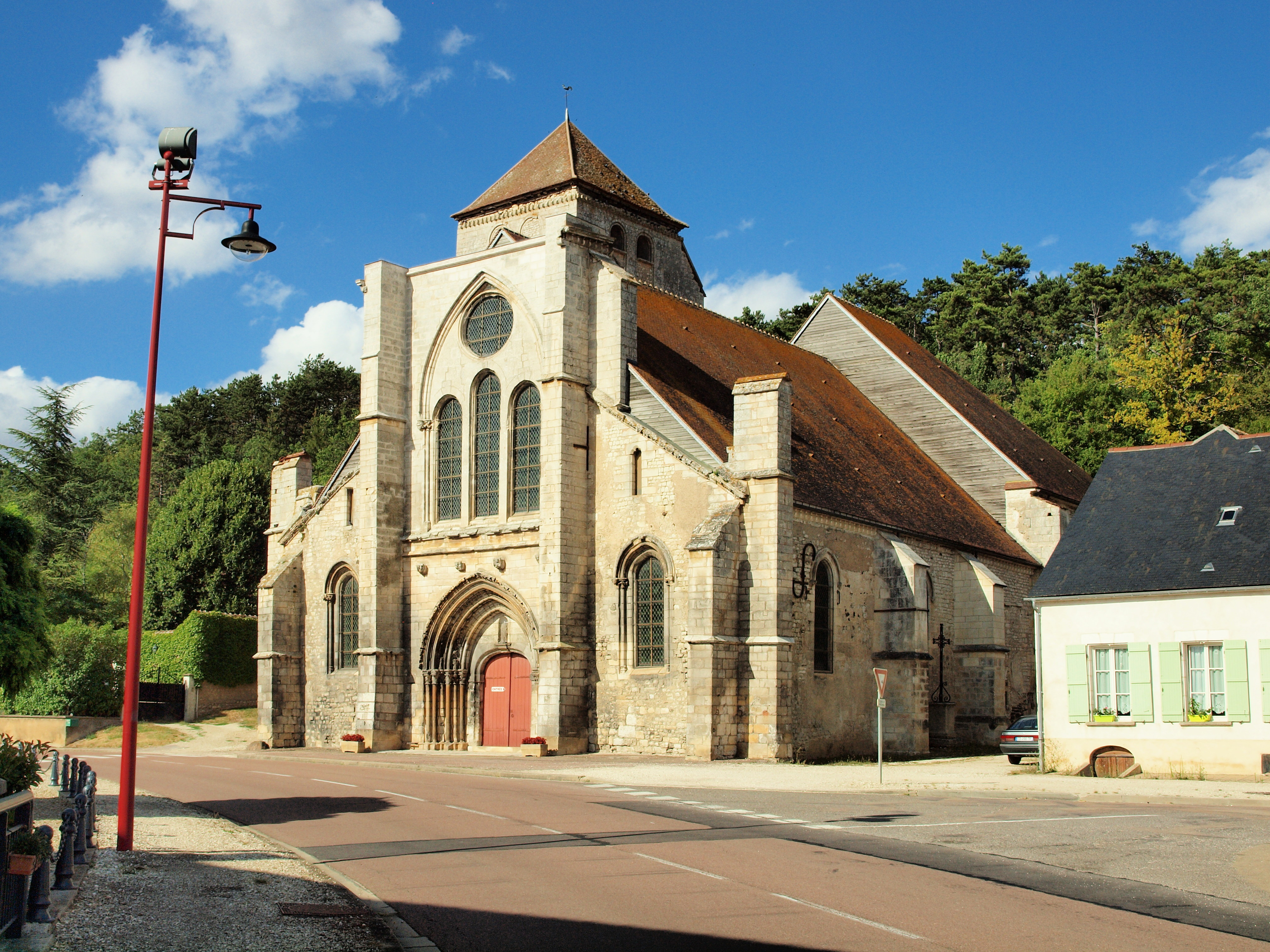 Église Saint-Phal de Gy-l'Évêque (Yonne, France)